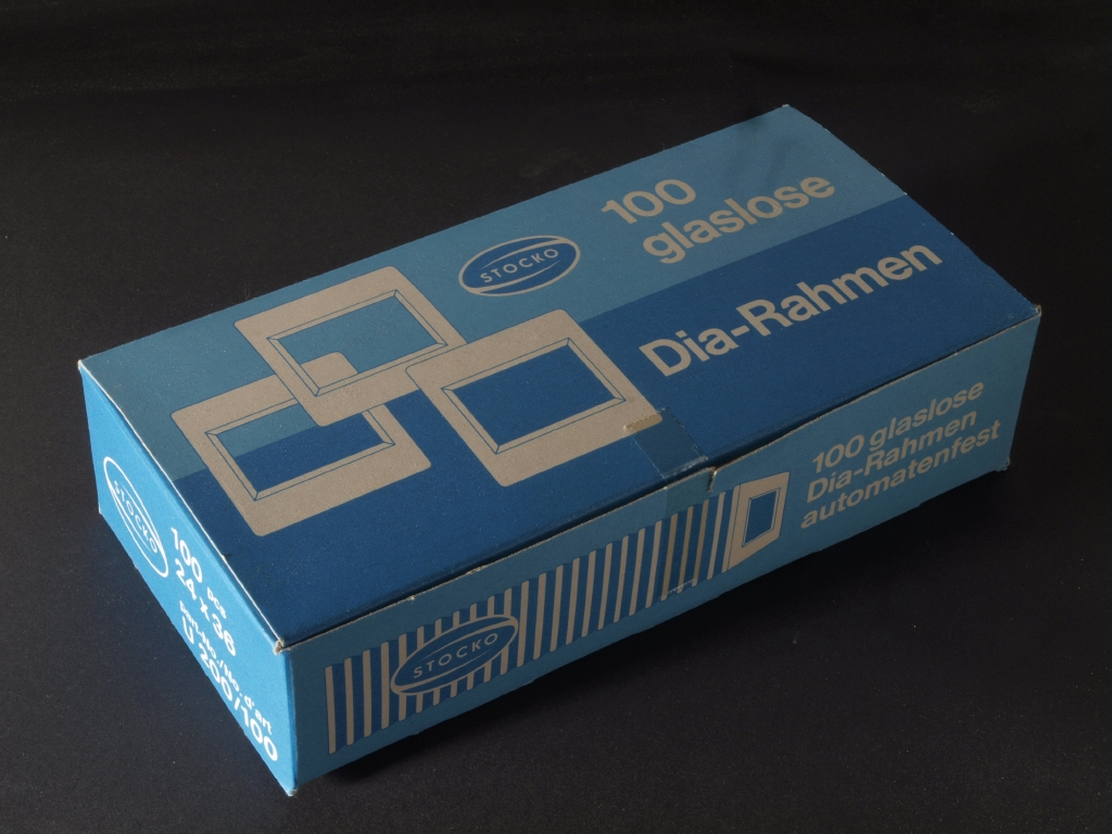 Stocko Wuppertal. Glaslose Diarahmen für das Kleinbildformat. Packung mit 100 Stück.